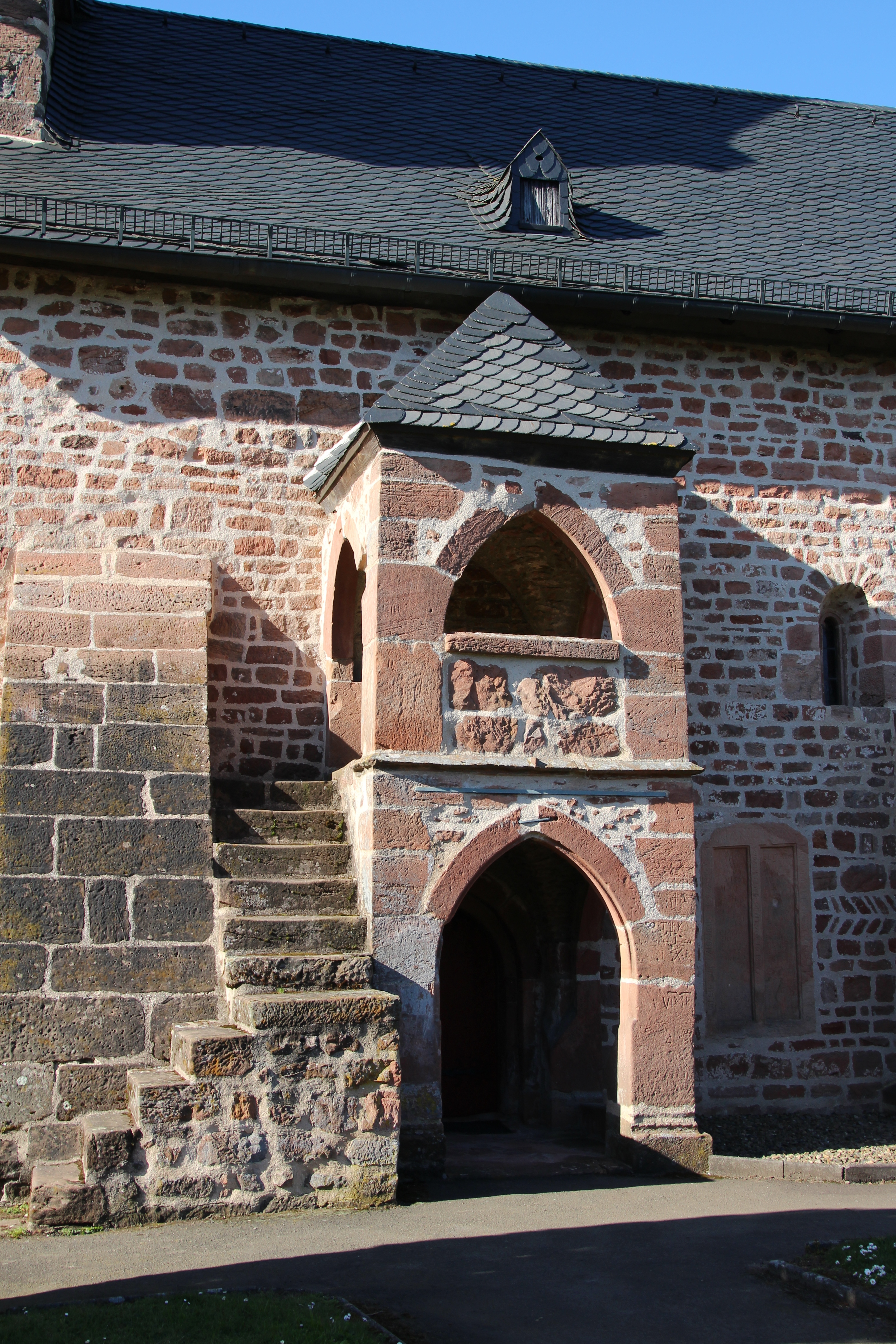 Christenberg